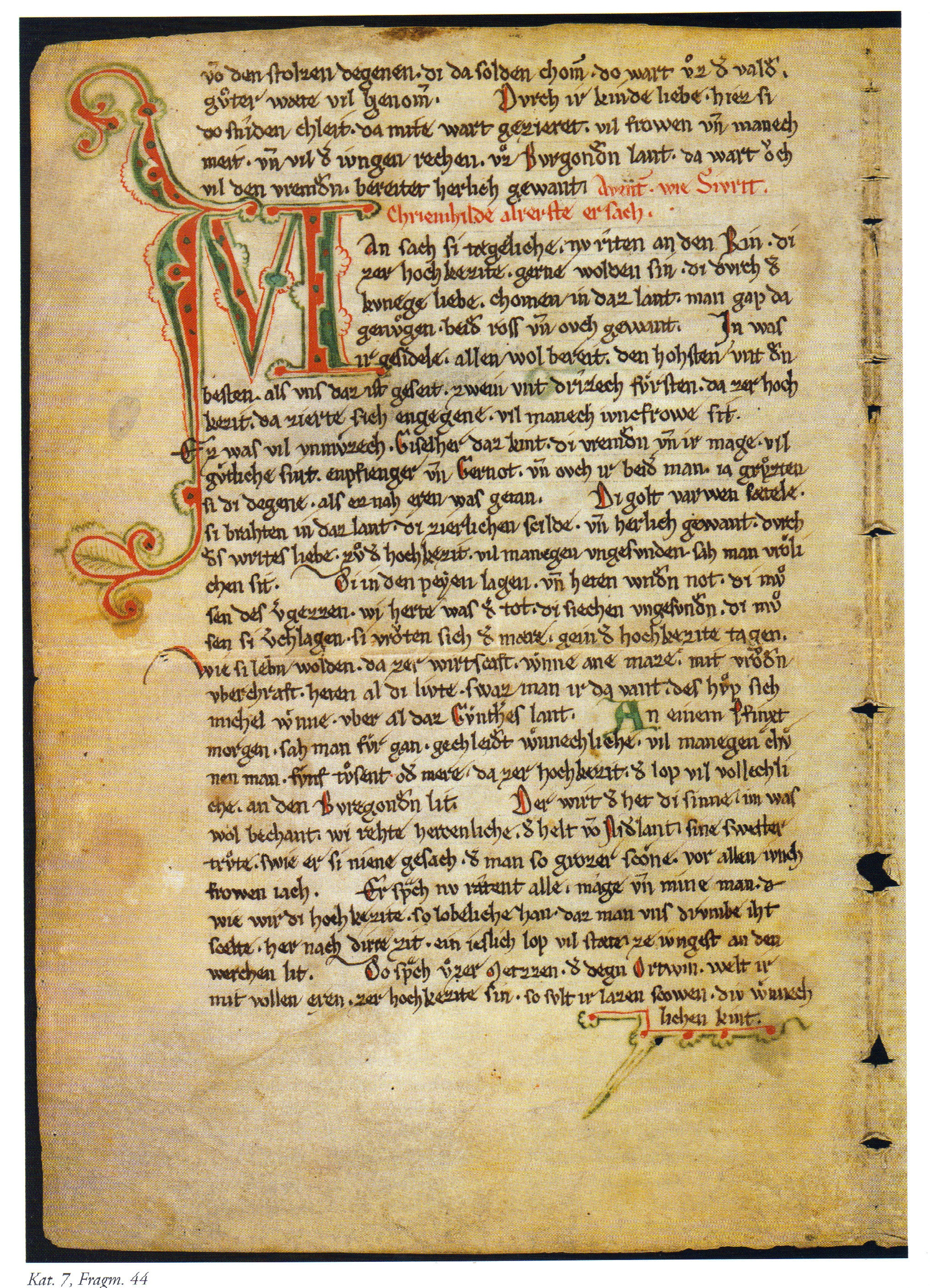 Nibelungenlied-Fragment, Berlin, SB, Fragm. 44